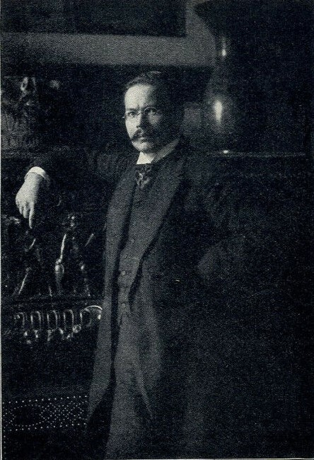 Hofzeichner Wilhelm Kimbel in Berlin, 1908. Foto von Marta Wolff/Martha Wolff